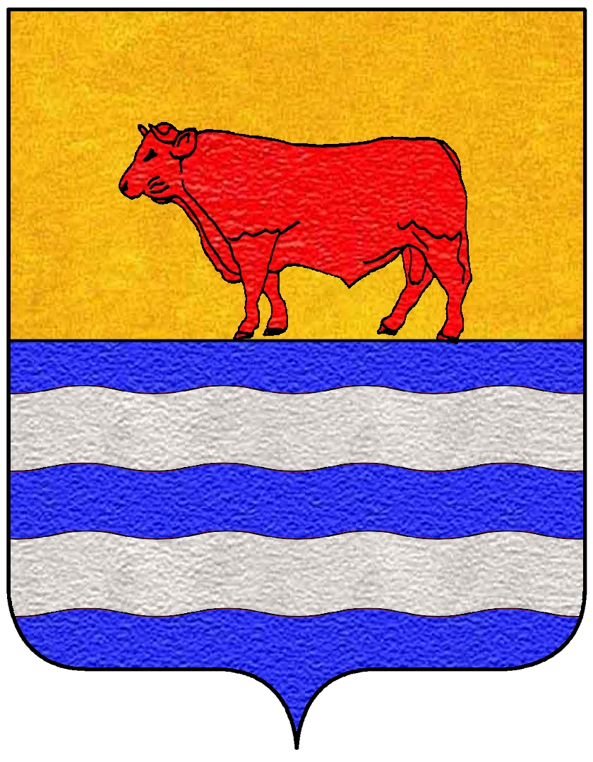 Stemma della famiglia Bonda (Bundić)